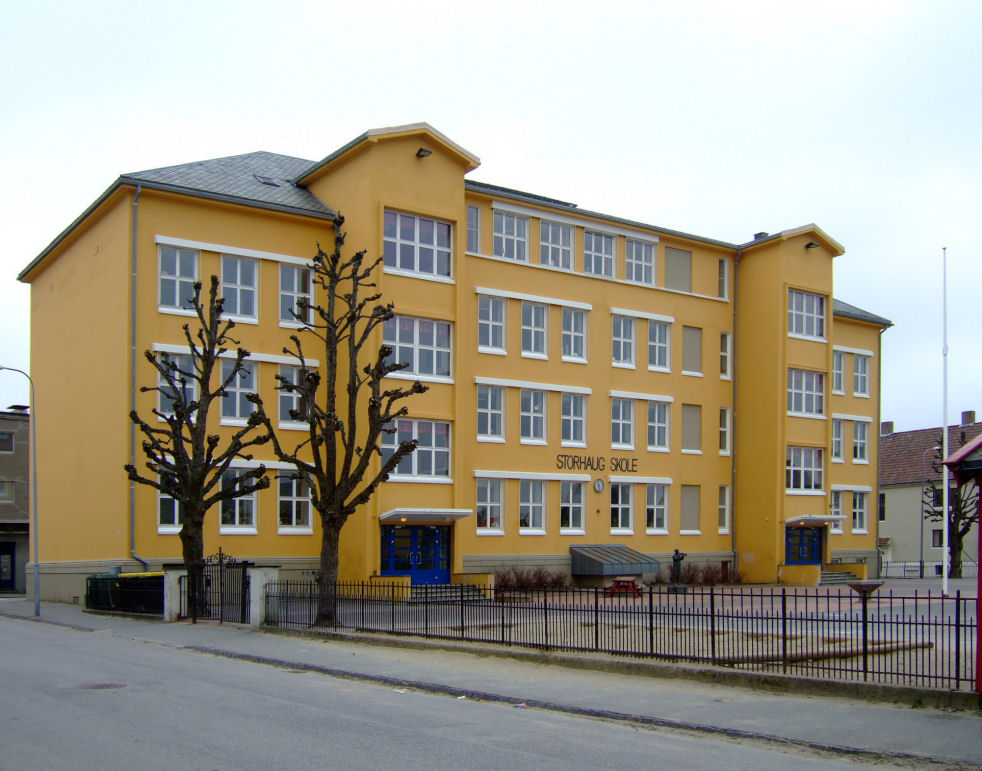 Storhaug skole, Stavanger